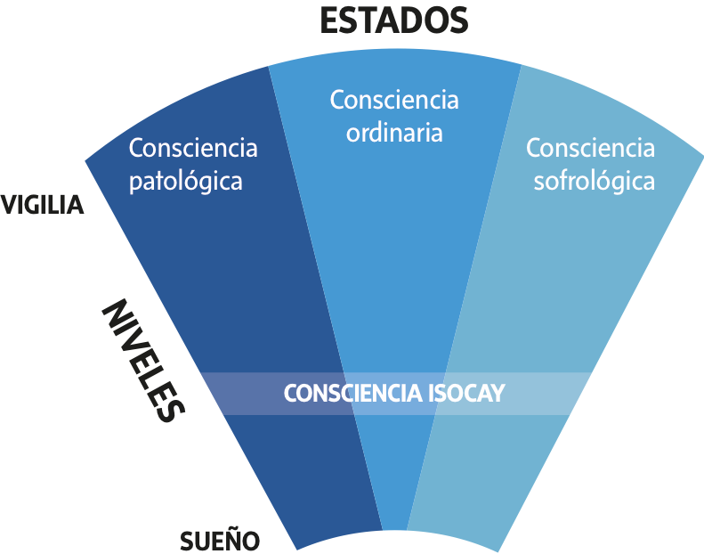 Diagrama de los estados y niveles de consciencia según A. Caycedo